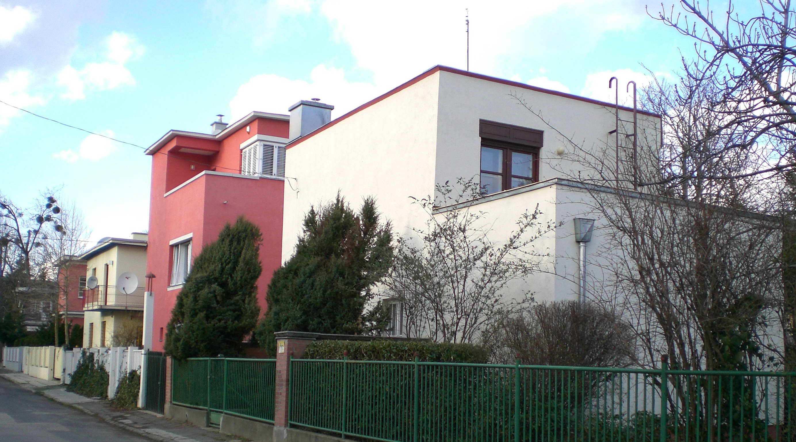 Bauhaus in Budapest about 1930